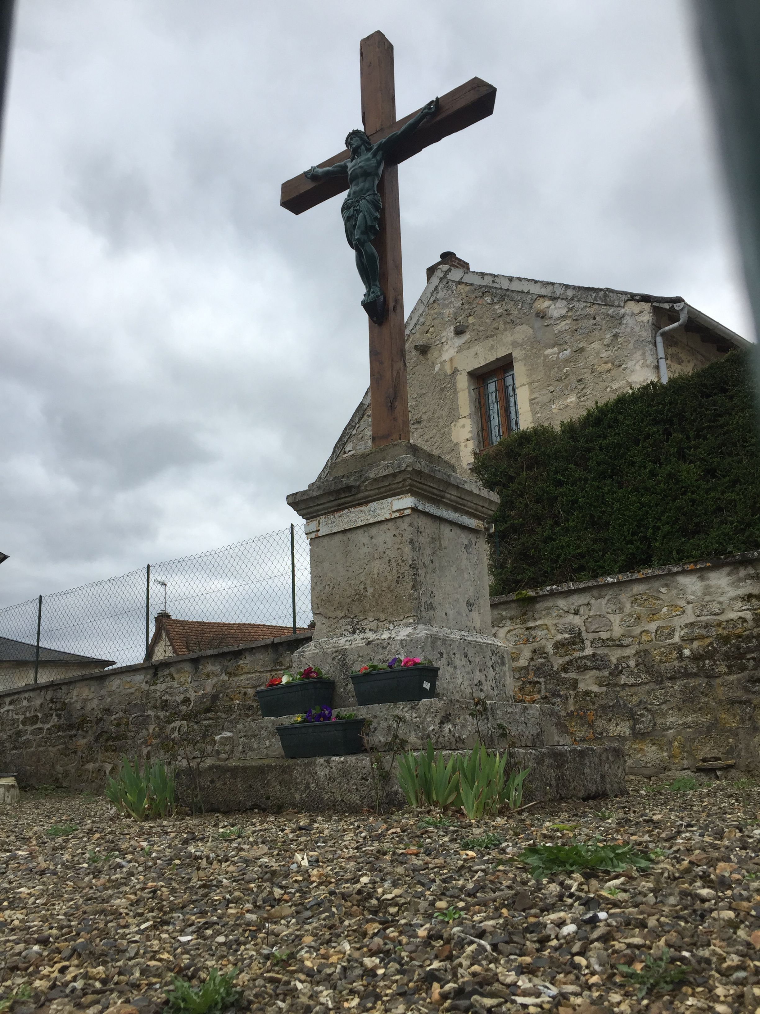 Photo du calvaire